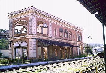 Antiga Estação de Porto Novo